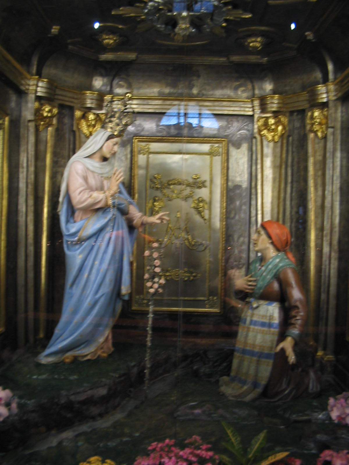 Sacro Speco posto sotto l'altare del Santuario di Caravaggio. Sculture di Leopold Moroder del 1932